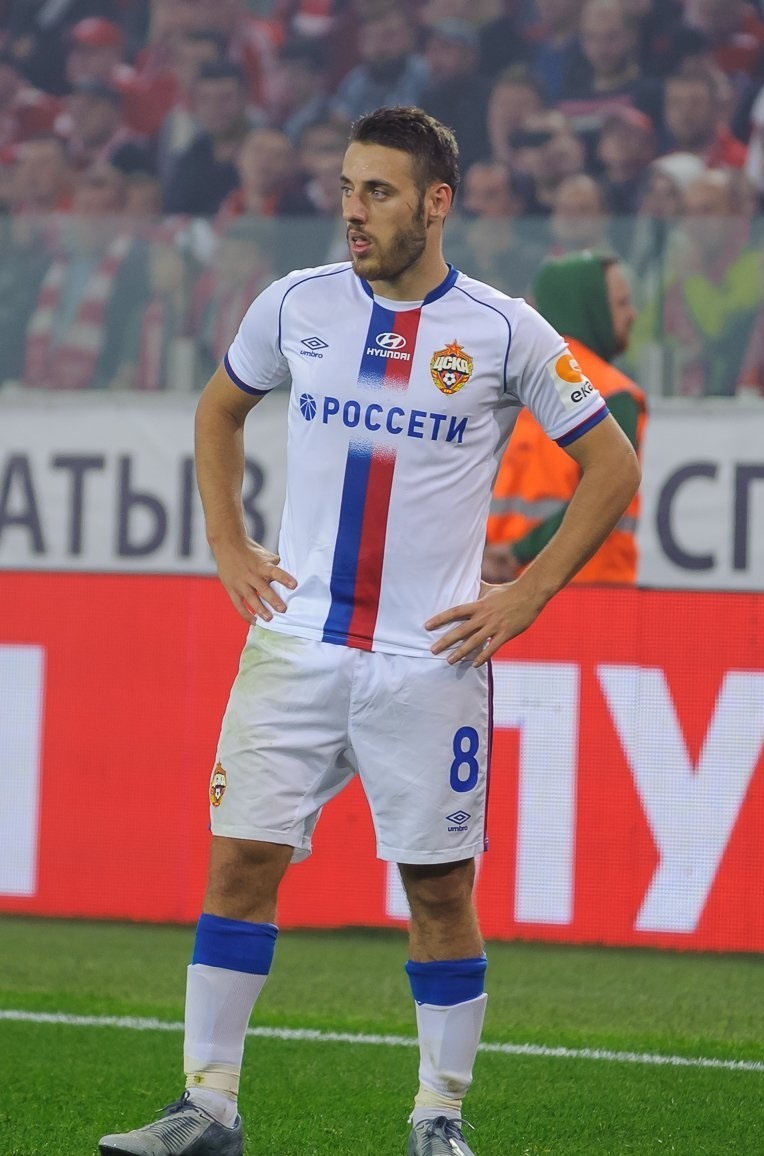 Никола Влашич в матче против «Спартака» 19 августа 2019 года